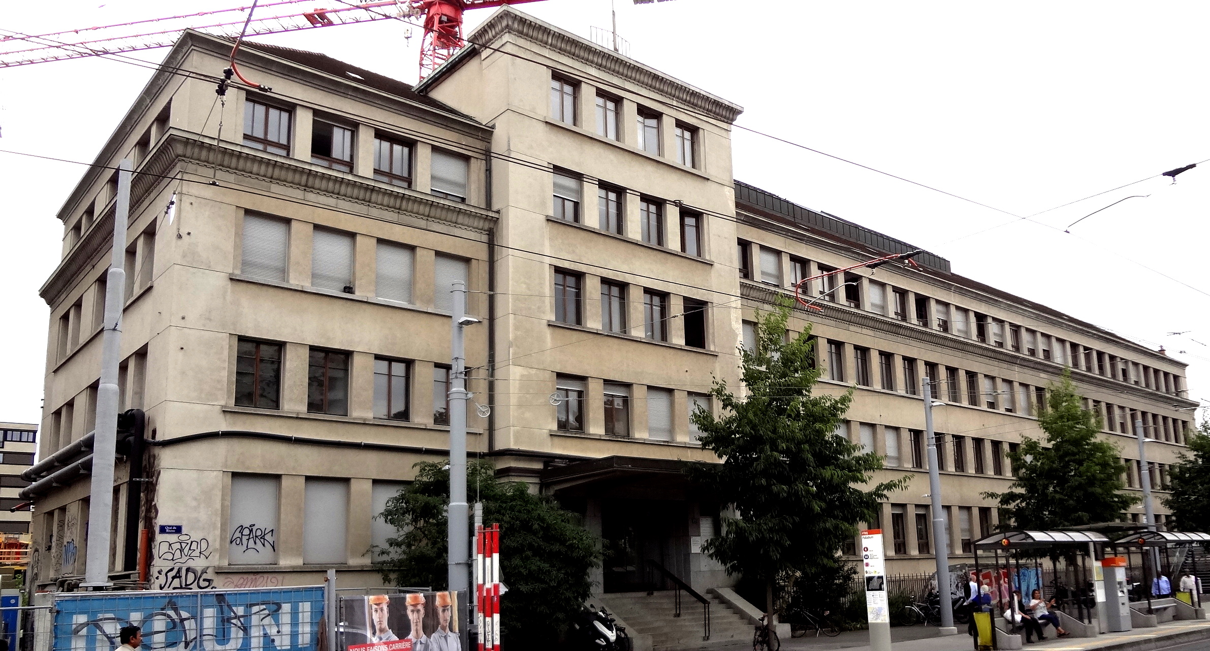 Bâtiment des Services industriels de Genève (SIG) au quai du Rhône. Construit en 1931-1932, c'était le centre administratif de SIG de 1932 à 1995. Il est occupé ensuite par plusieurs services de l'État. Bâtiment de 72 m de long par 15 m de large, construit en béton armé (y compris la charpente), toit couvert de tuiles rouges. « La façade extérieure est constituée d'un revêtement en contex – procédé nouveau à Genève – formé de cailloux concassés du Salève lavés à l'acide. » (Journal de Genève du 9 novembre 1932). Bâtiment préservé lors de la conversion de la friche industrielle en écoquartier (2013-2016). Photographie prise pendant les travaux.